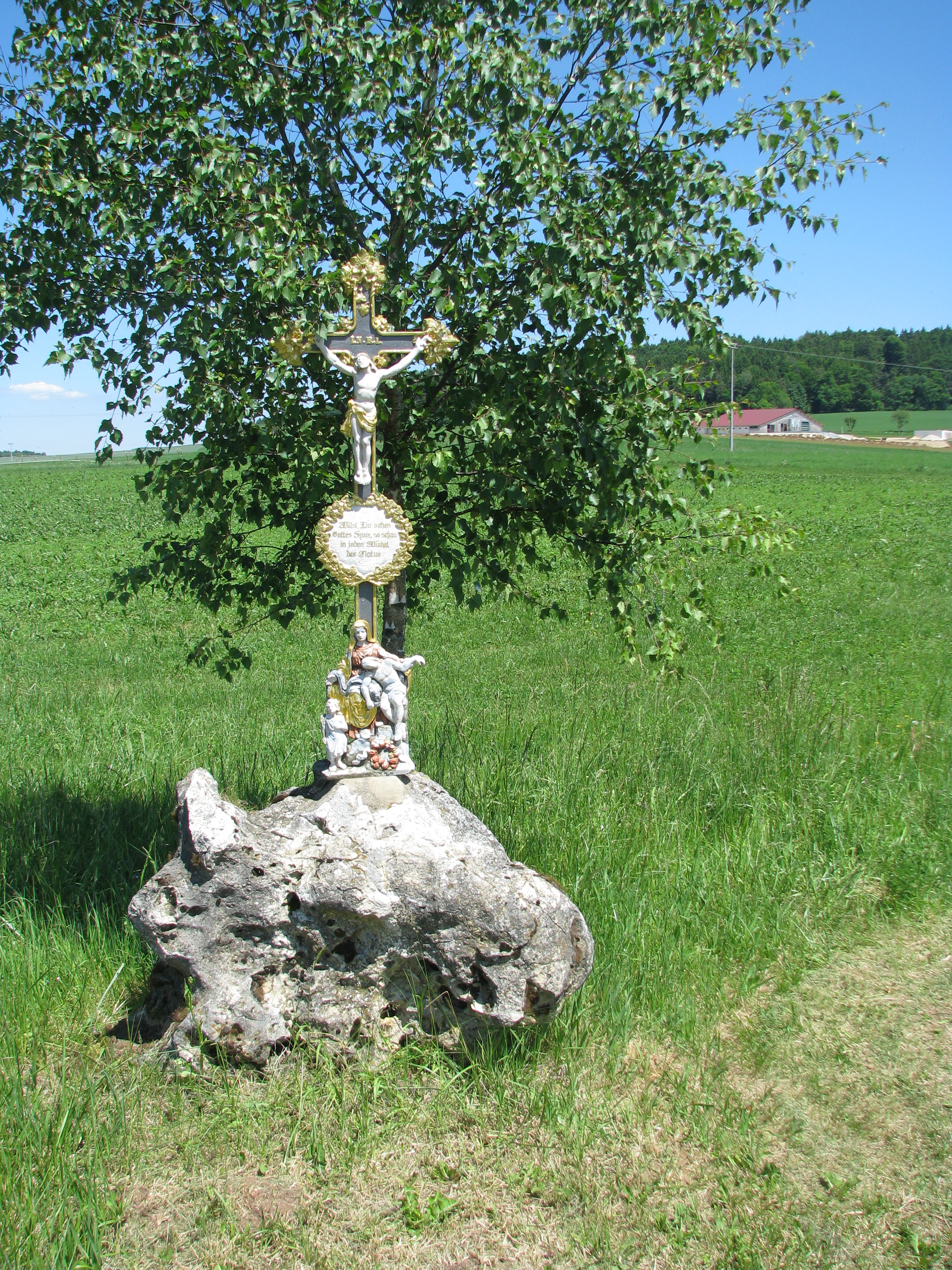 Oberweickenhof, Gemeindeteil von Velburg im Landkreis Neumarkt i. d. Opf., Bayern, Wegkreuz